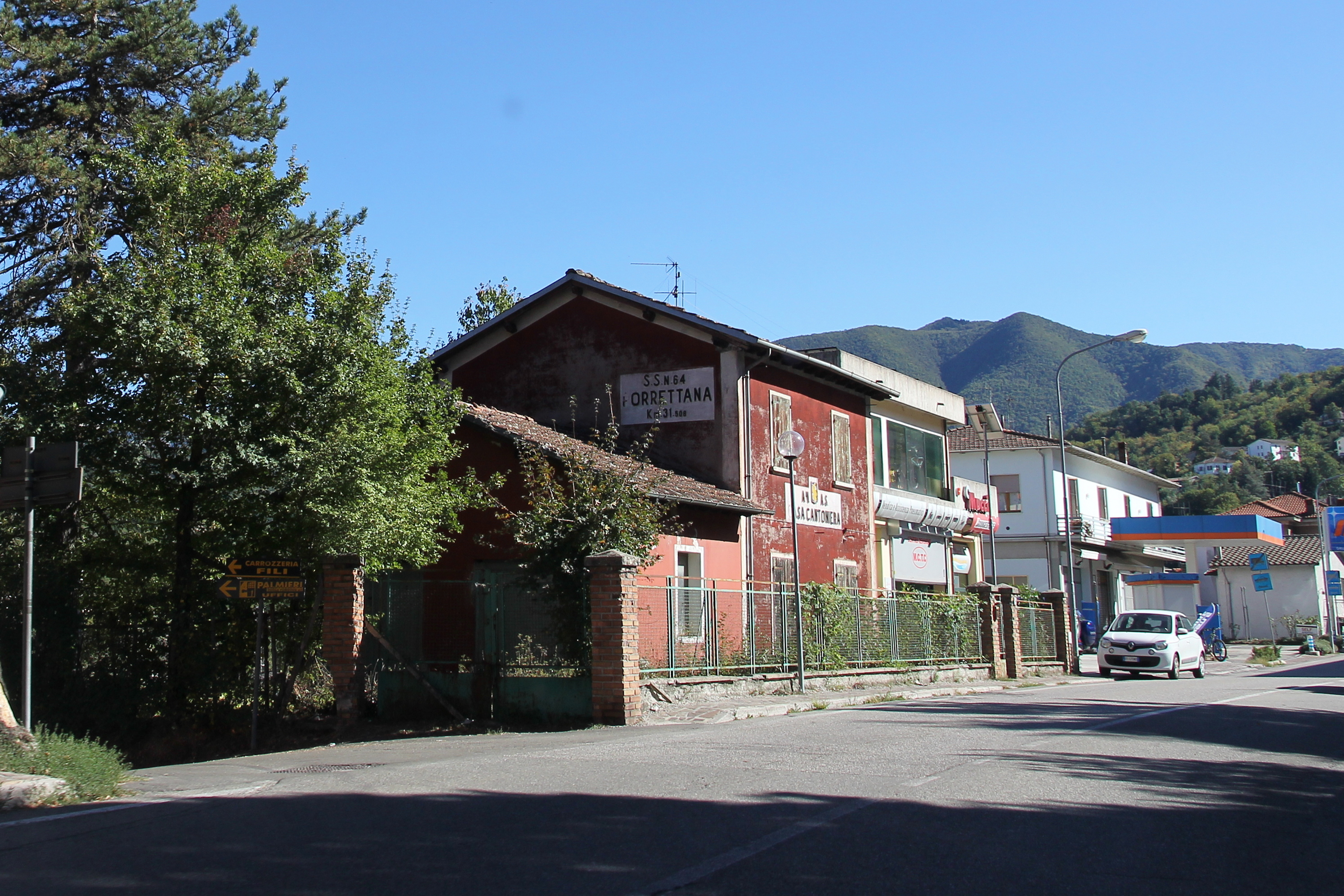 Ponte della Venturina, casa cantoniera Km 31 SS64 Porrettana